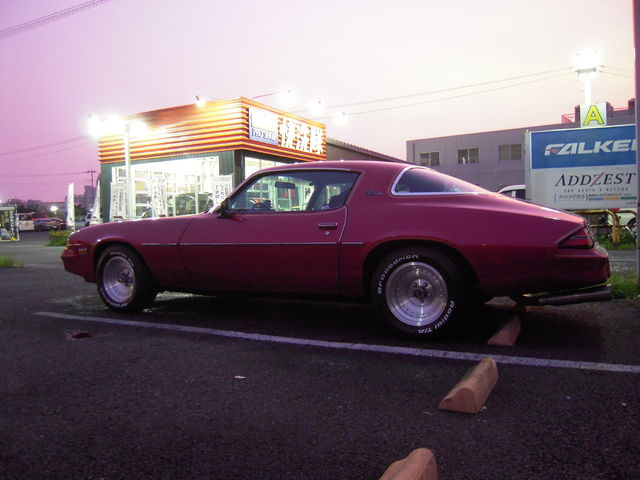 Camaro Berlinetta 79